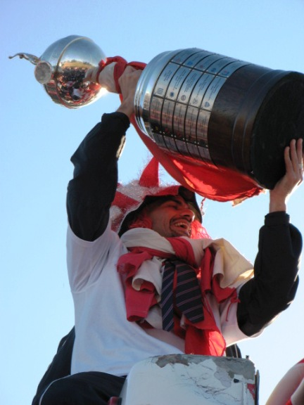 Juan Sebastián Verón, capitán de Estudiantes de La Plata, celebrando la conquista de la Copa Libertadores 2009.